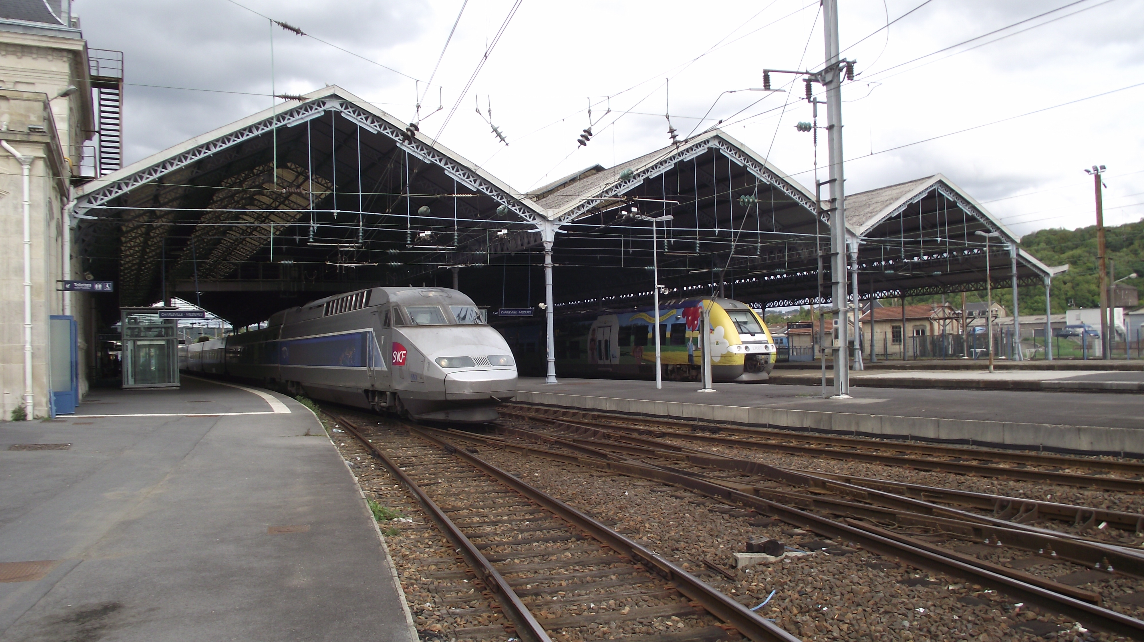 Charleville-Méziere station met een TGV en TER trein